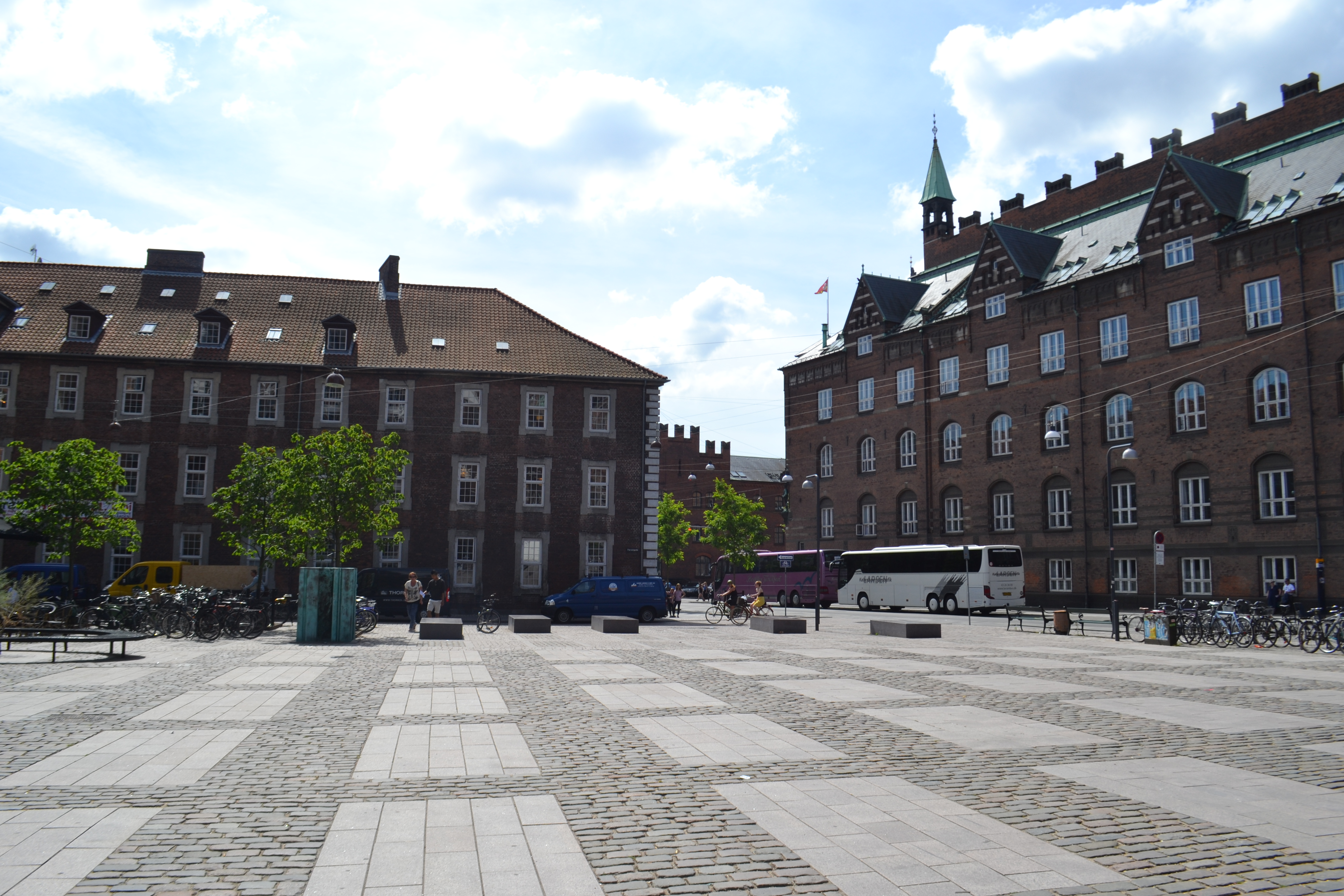 Regnbuepladsen, Copenhagen, Denmark